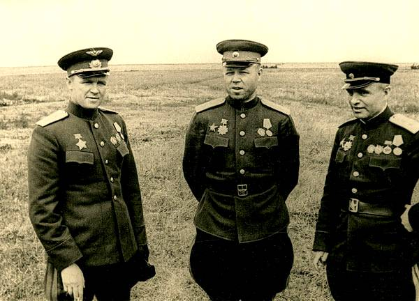 Группа военачальников на 1-м Белорусском фронте (слева-направо): генерал-полковник авиации Руденко С.И., генерал-полковник Малинин М.С., генерал-полковник артиллерии Казаков В.И. 1944 год